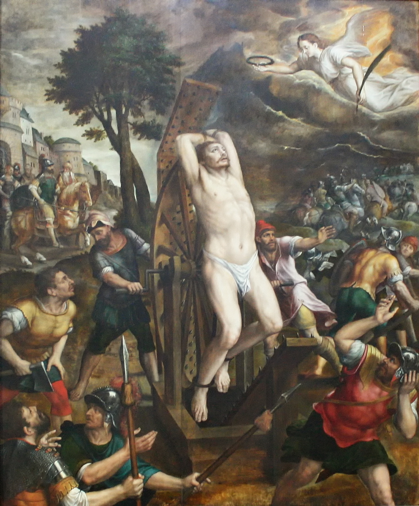 Sint-Romboutskathedraal in Mechelen, provincie Antwerpen, België. Schilderij "De marteling van Sint-Joris" door Michiel Coxcie in de koormomgang